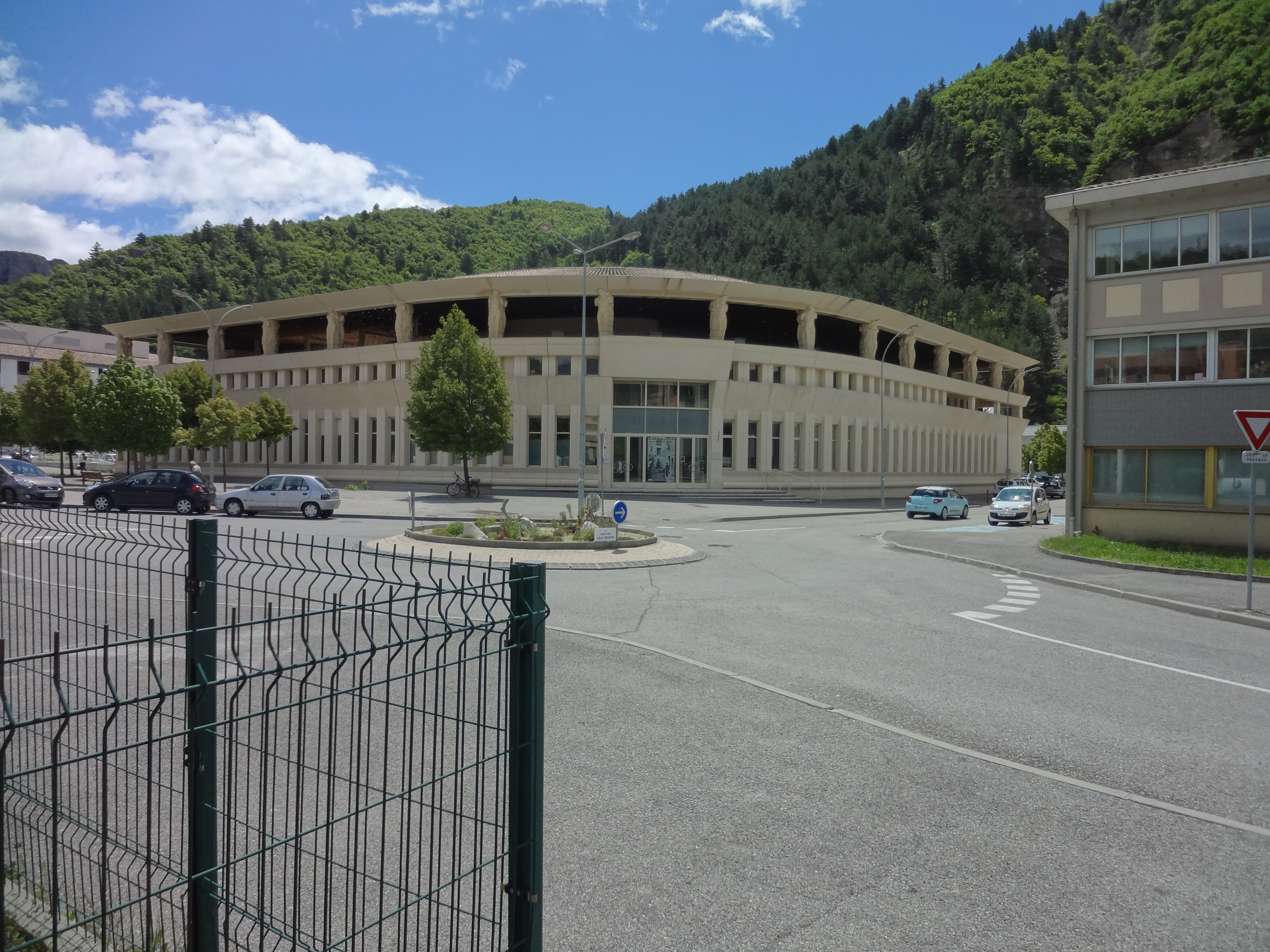 Bâtiment des archives départementales des Alpes-de-Haute-Provence in Digne-les-Bains